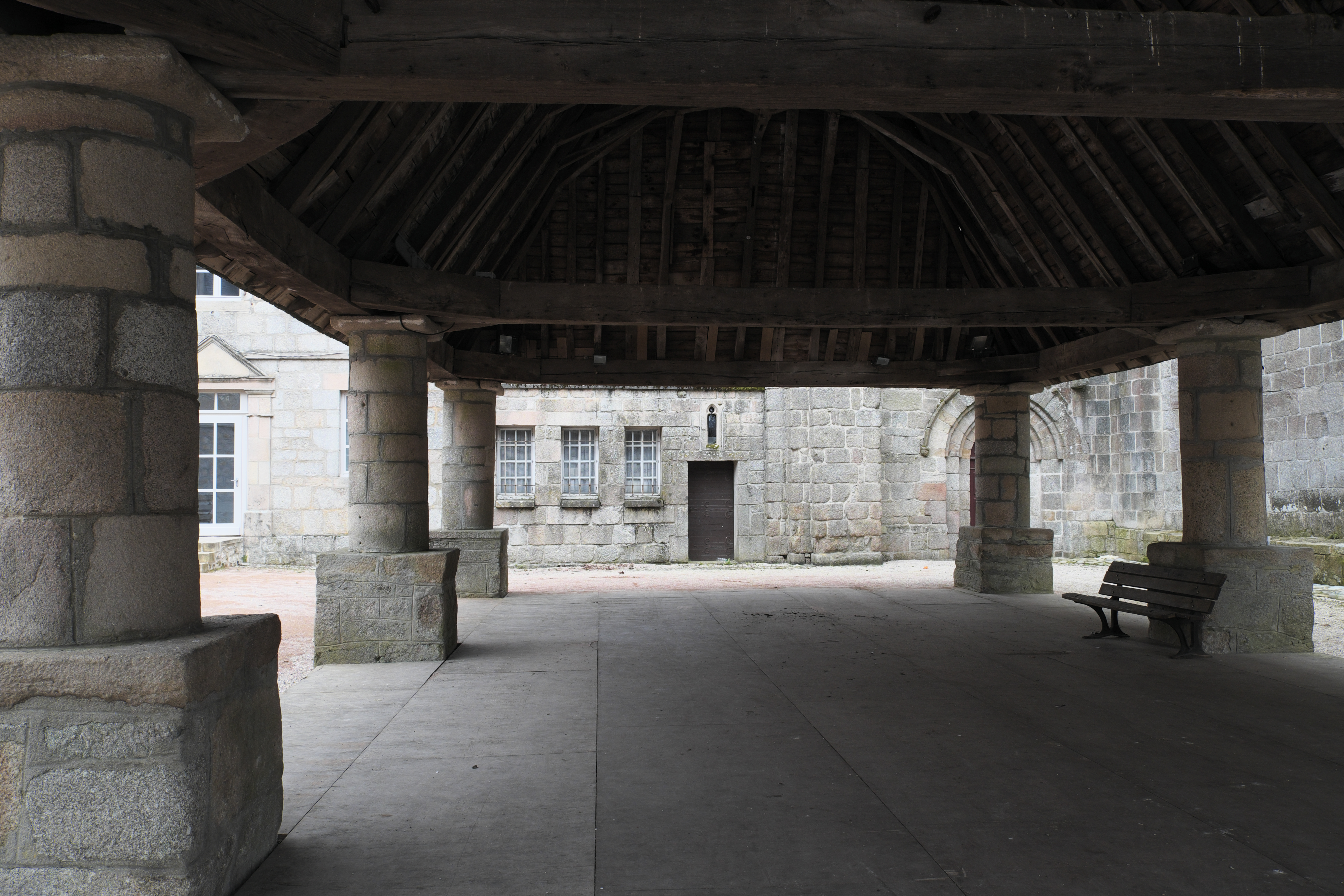 Markthalle in Meymac im Département Corrèze (Nouvelle-Aquitaine/Frankreich), aus dem 16. Jahrhundert